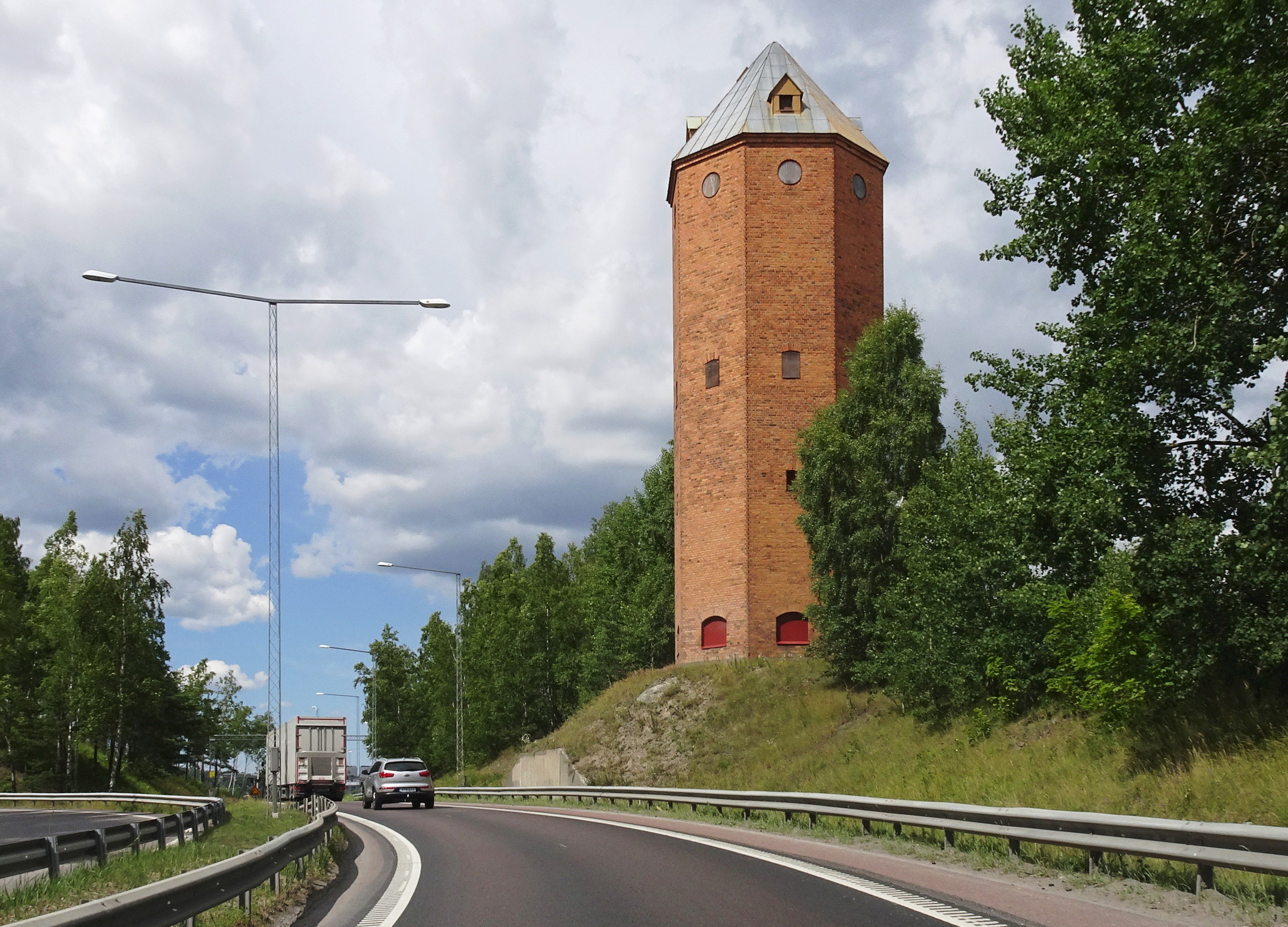 Södertälje Vattentorn vid Södertälje hamn, byggnadsminne